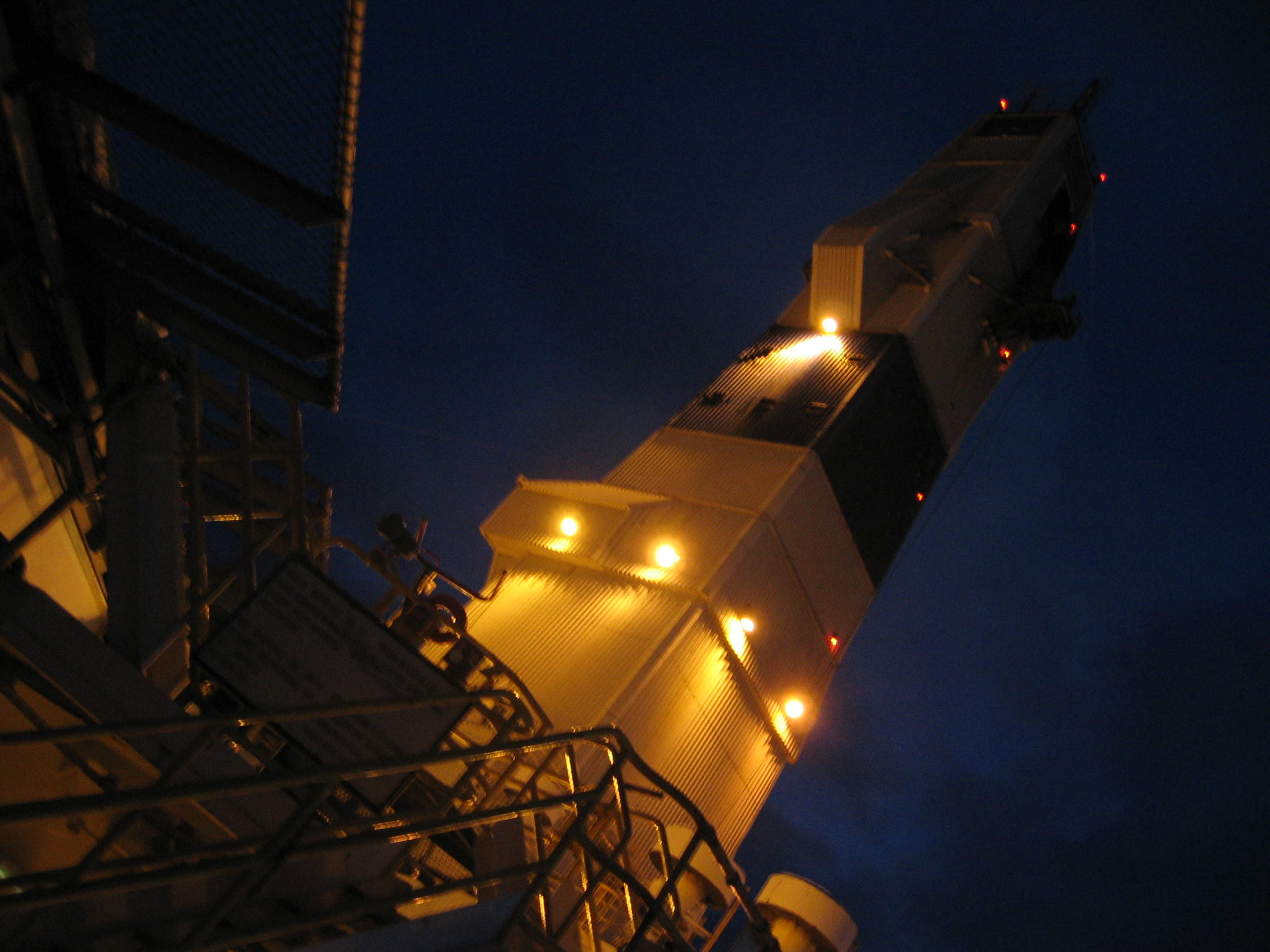 Polar Poineer på Snøhvit i 2005